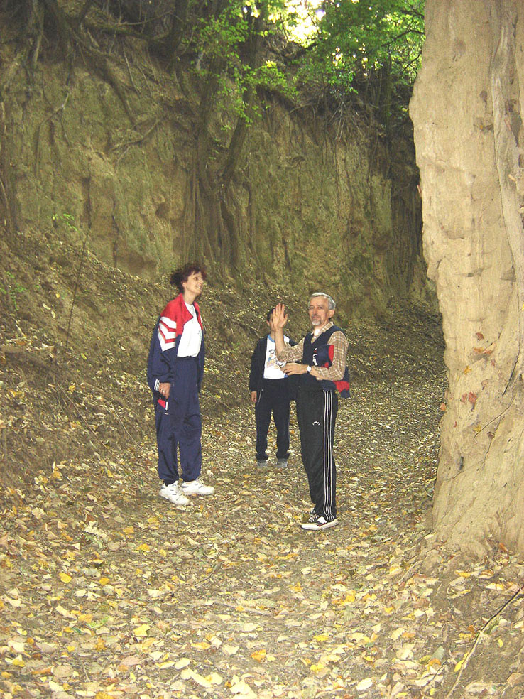 Banska kosa, surduk, Baranja